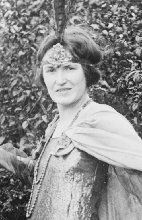 Actress Gertrude Robinson